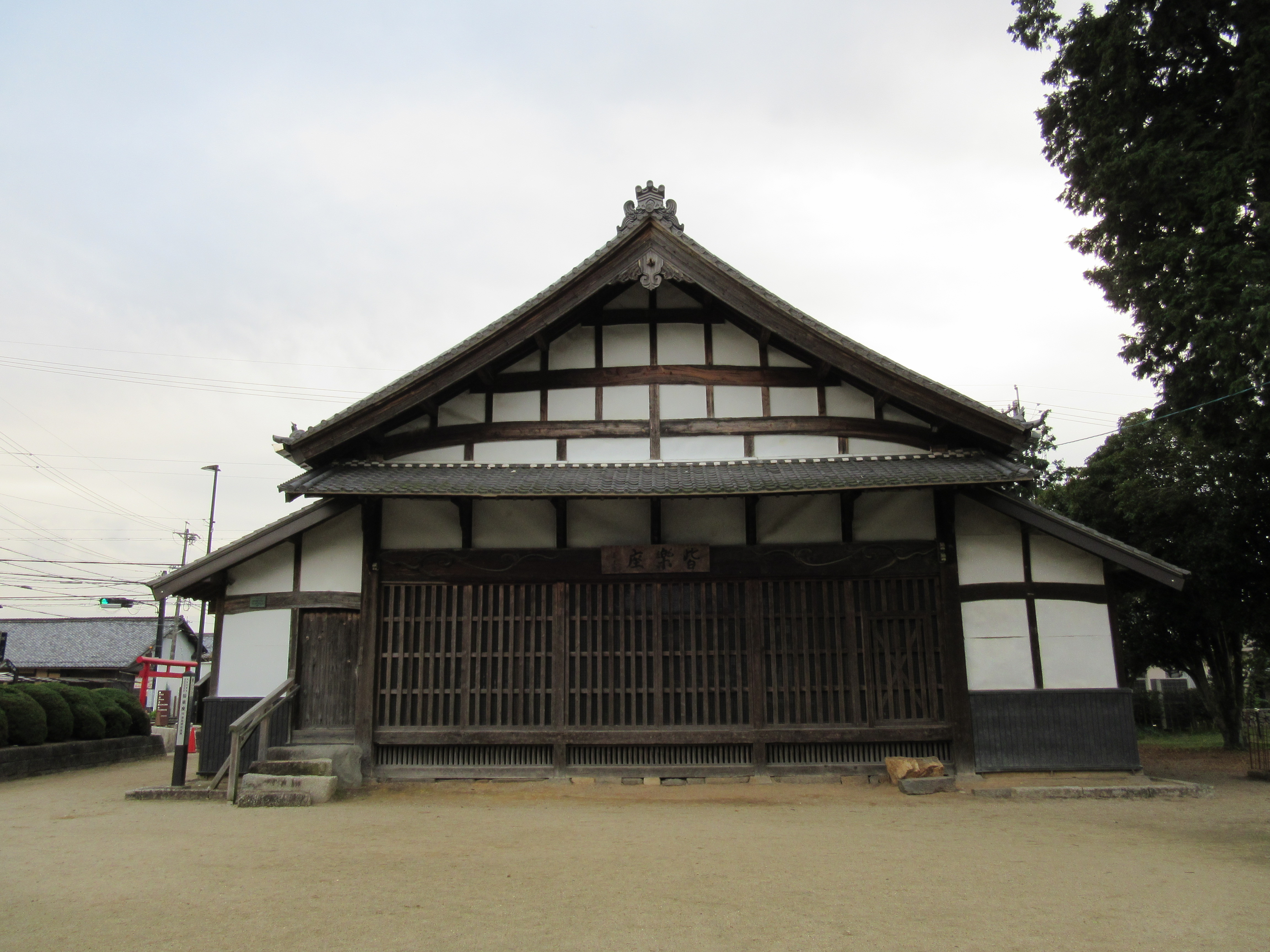 皆楽座（各務原市鵜沼羽場町）